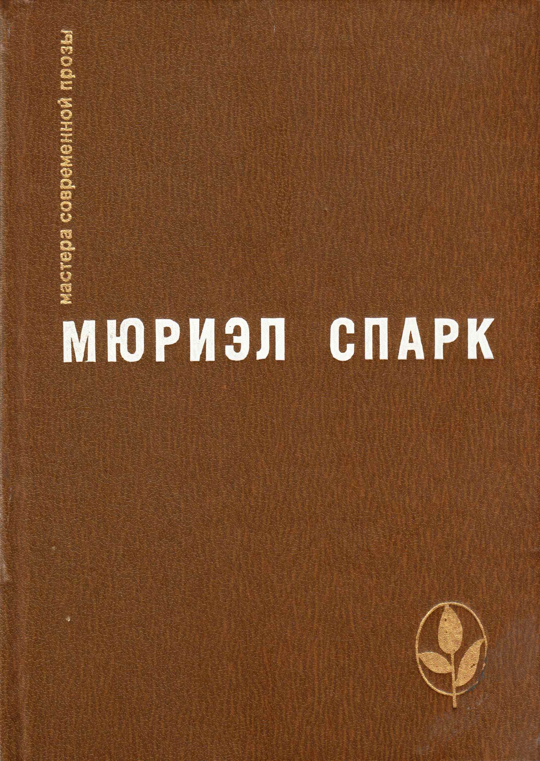 обложка книги